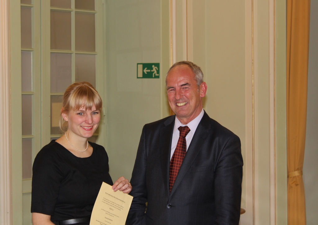 Wolf-Erich-Kellner-Preis Verleihung 2016. Franziska Meifort, Laudator Prof. Joachim Scholtyseck